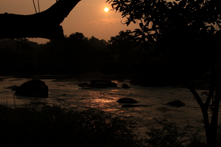 Mặt trời lặn sau một ngày...